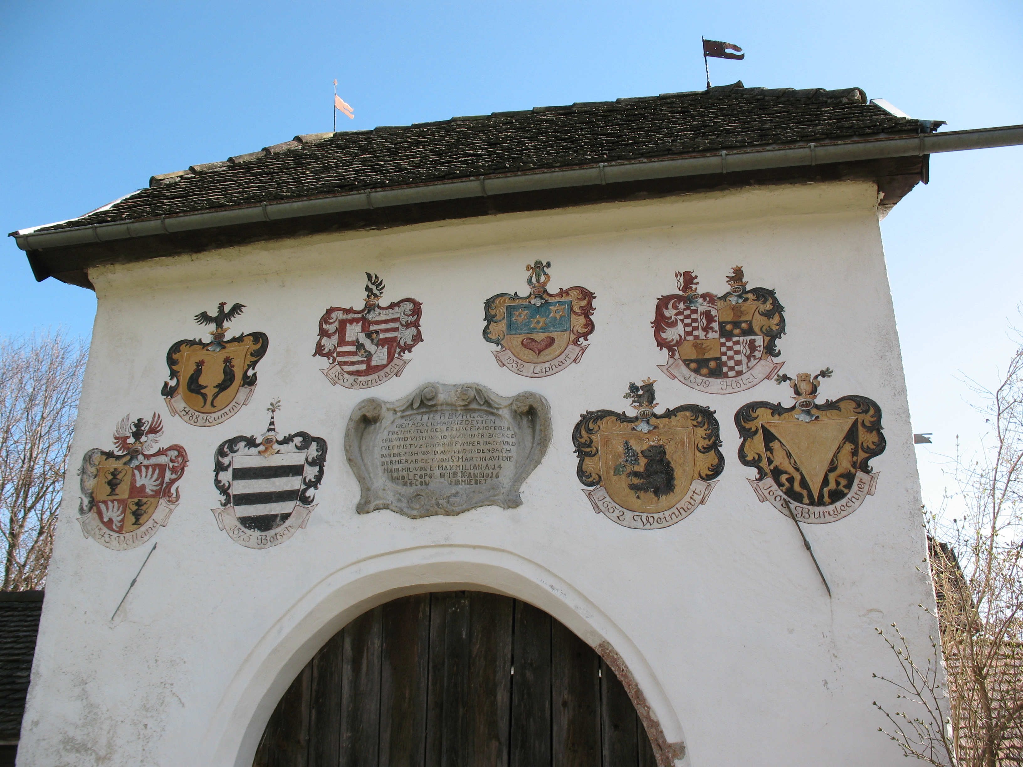 Ansitz Thierburg